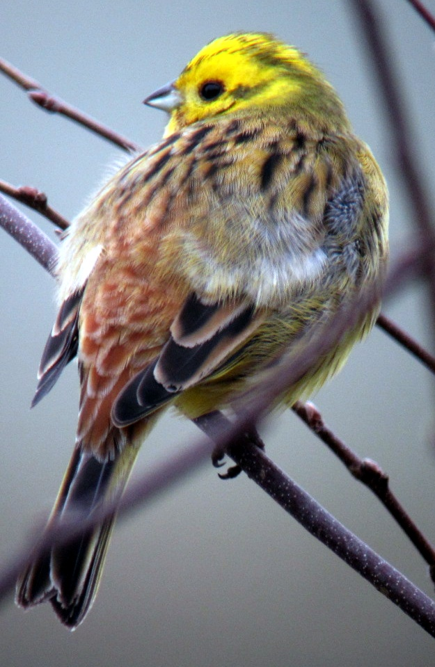 Goldammer im Februar